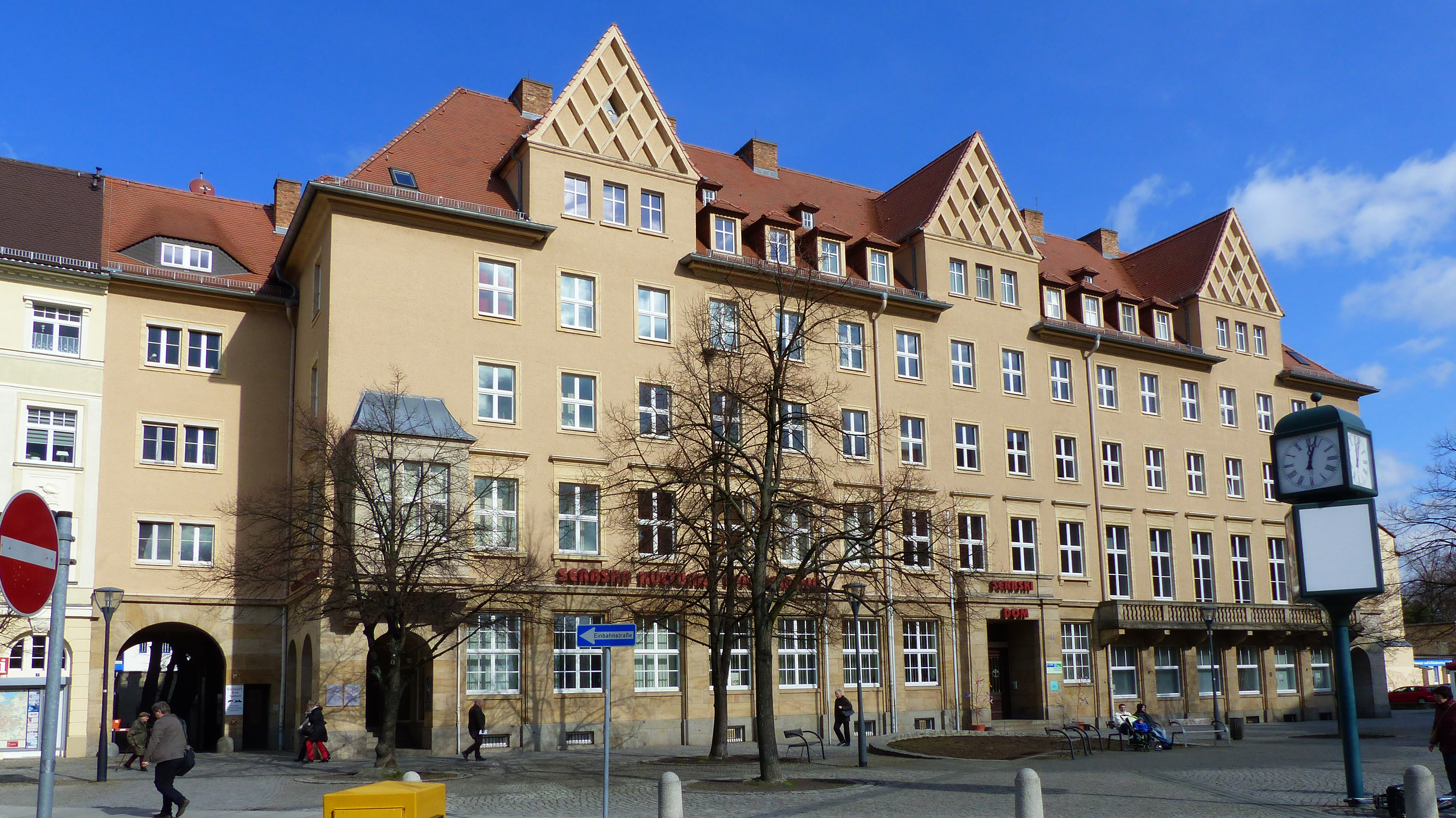 Haus der Sorben, Postplatz 2, Bautzen Hornjoserbsce: Serbski dom w Budyšinje.